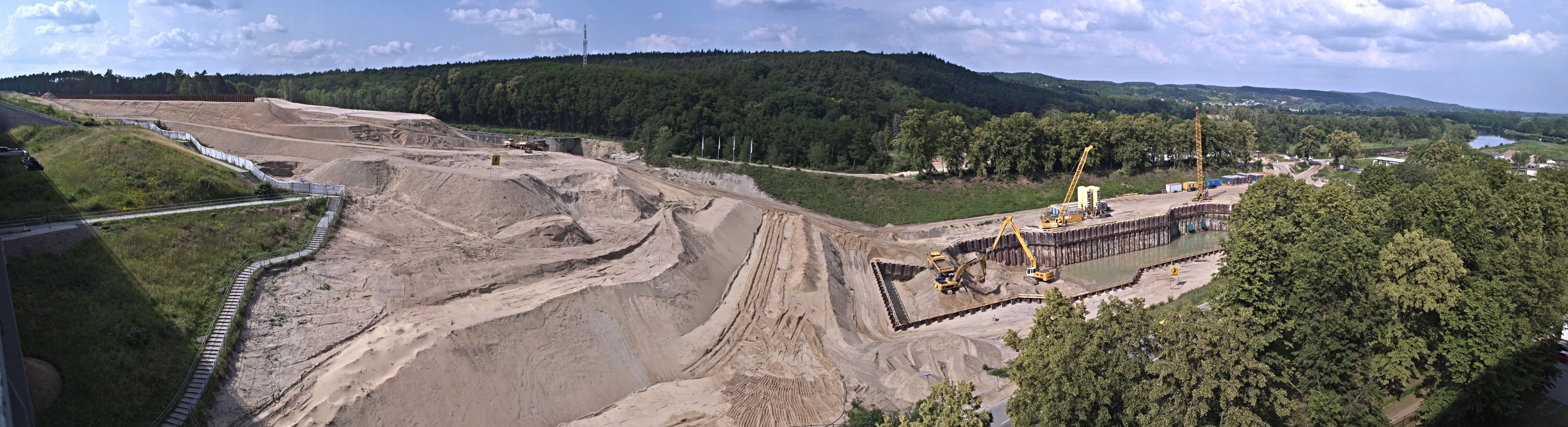 Panorama der Baustelle des Schiffshebewerks Niederfinow Nord